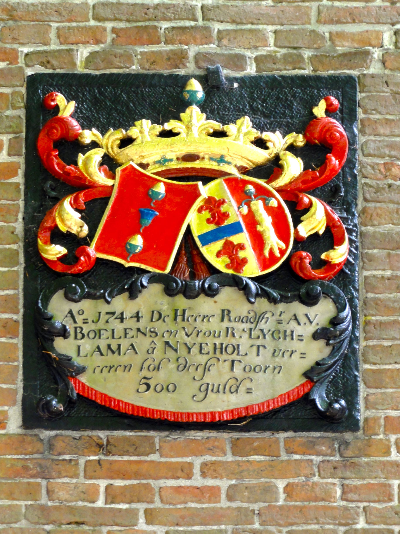 Steen in de toren van de Hippolytuskerk in Olterterp